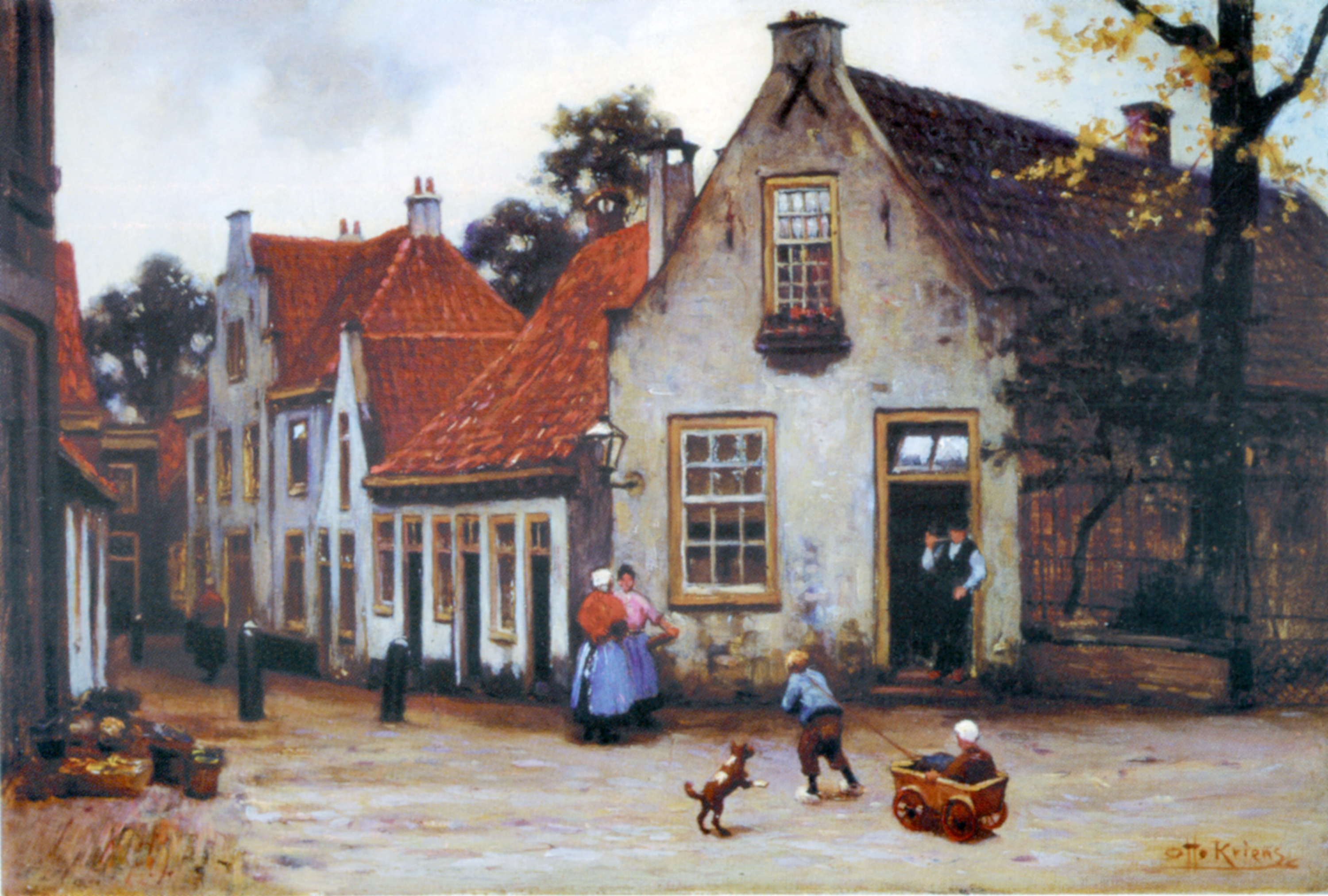 Otto Kriens (1873-1930): Gezicht op de Kerkstraat te Rijswijk, ca 1900. Bron: overgenomen van een wenskaart PD wegens ouderdom Collectie Museum Rijswijk